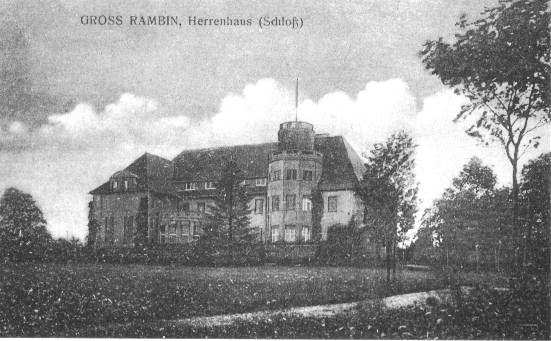 Dwór w Rąbinie ok. 1906